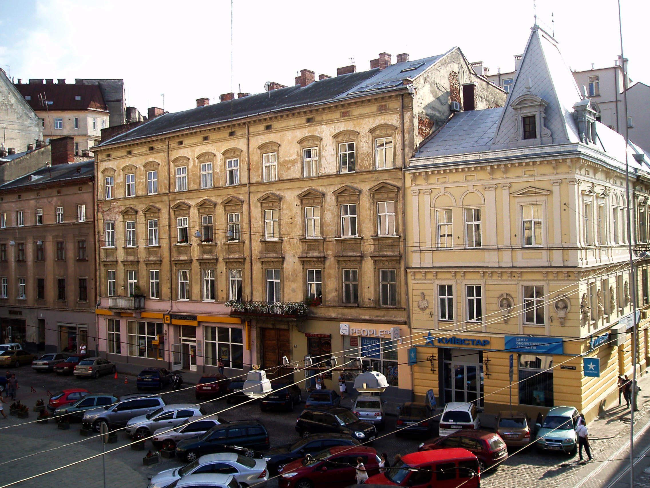 Площа Соборна у Львові